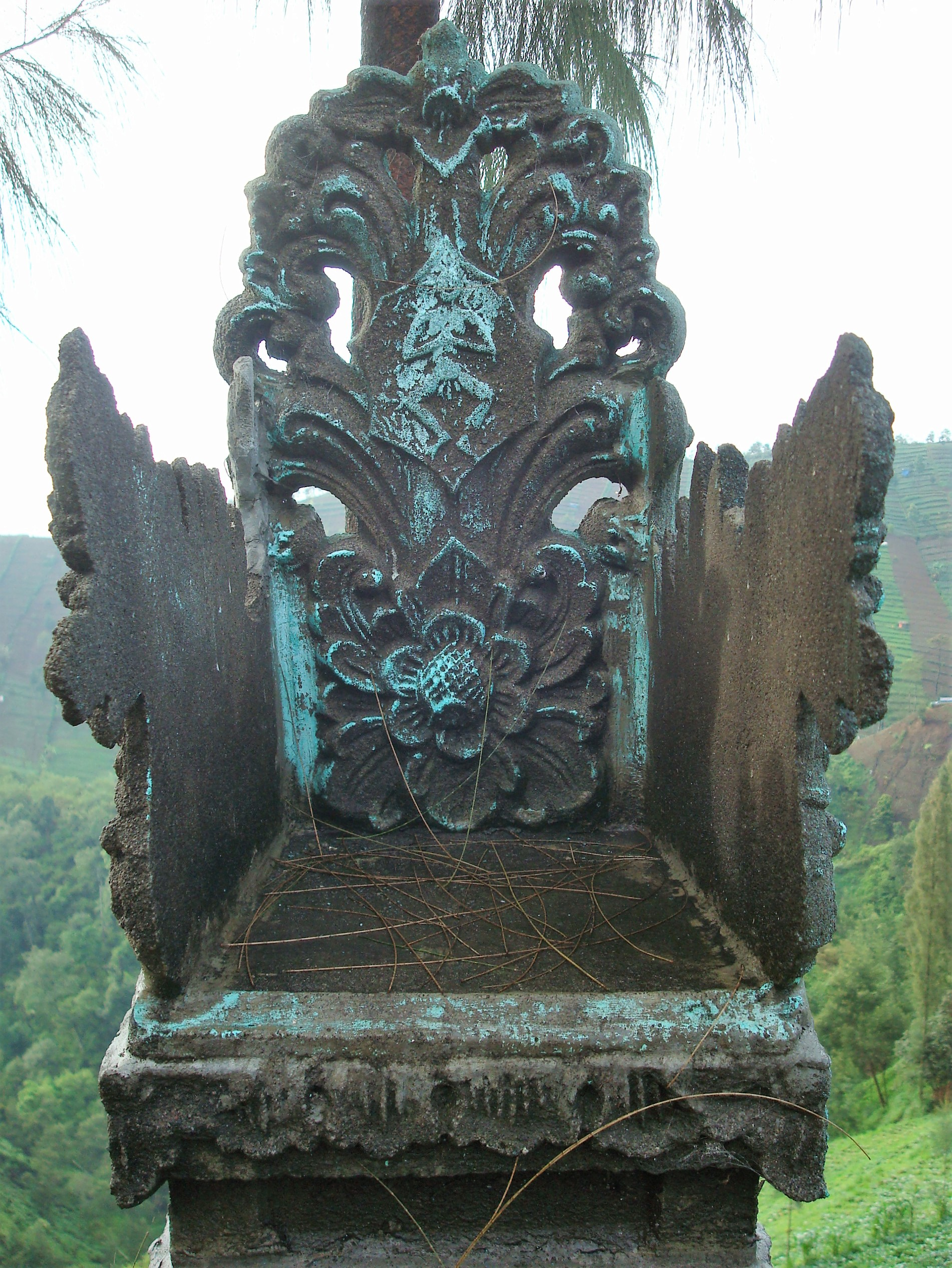 Lotossitz auf dem Weg zum Bromo Tengger Semeru National Park